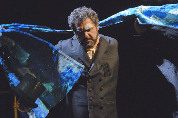 Víctor Torres como Rigoletto. Opera de Bordeaux